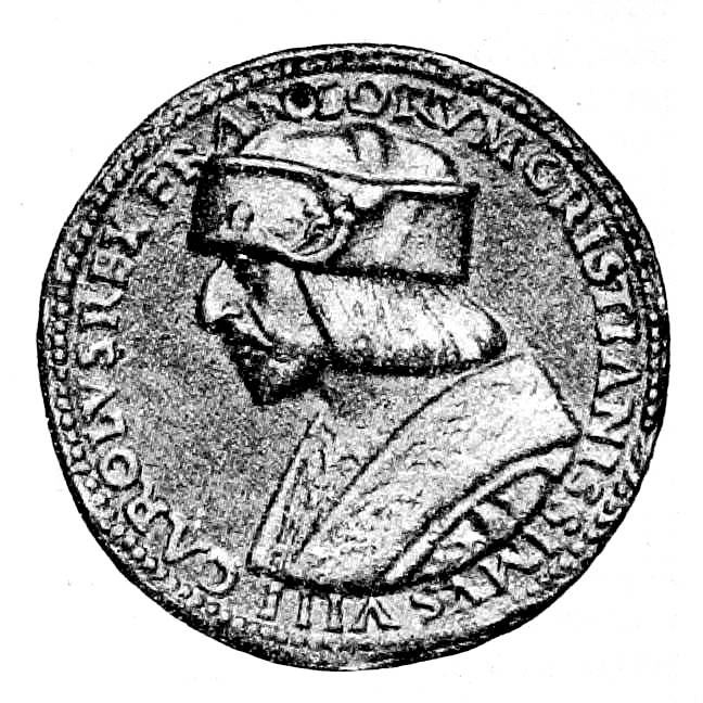 Это изображение было использовано для иллюстрирования статьи «Карл VIII» опубликованной в двенадцатом томе «Военной энциклопедии», который был издан книгоиздательским товариществом И. Д. Сытина в 1913 году в столице Российской империи городе Санкт-Петербурге. Более подробное описание к этой картинке можно прочесть в указанной выше статье.